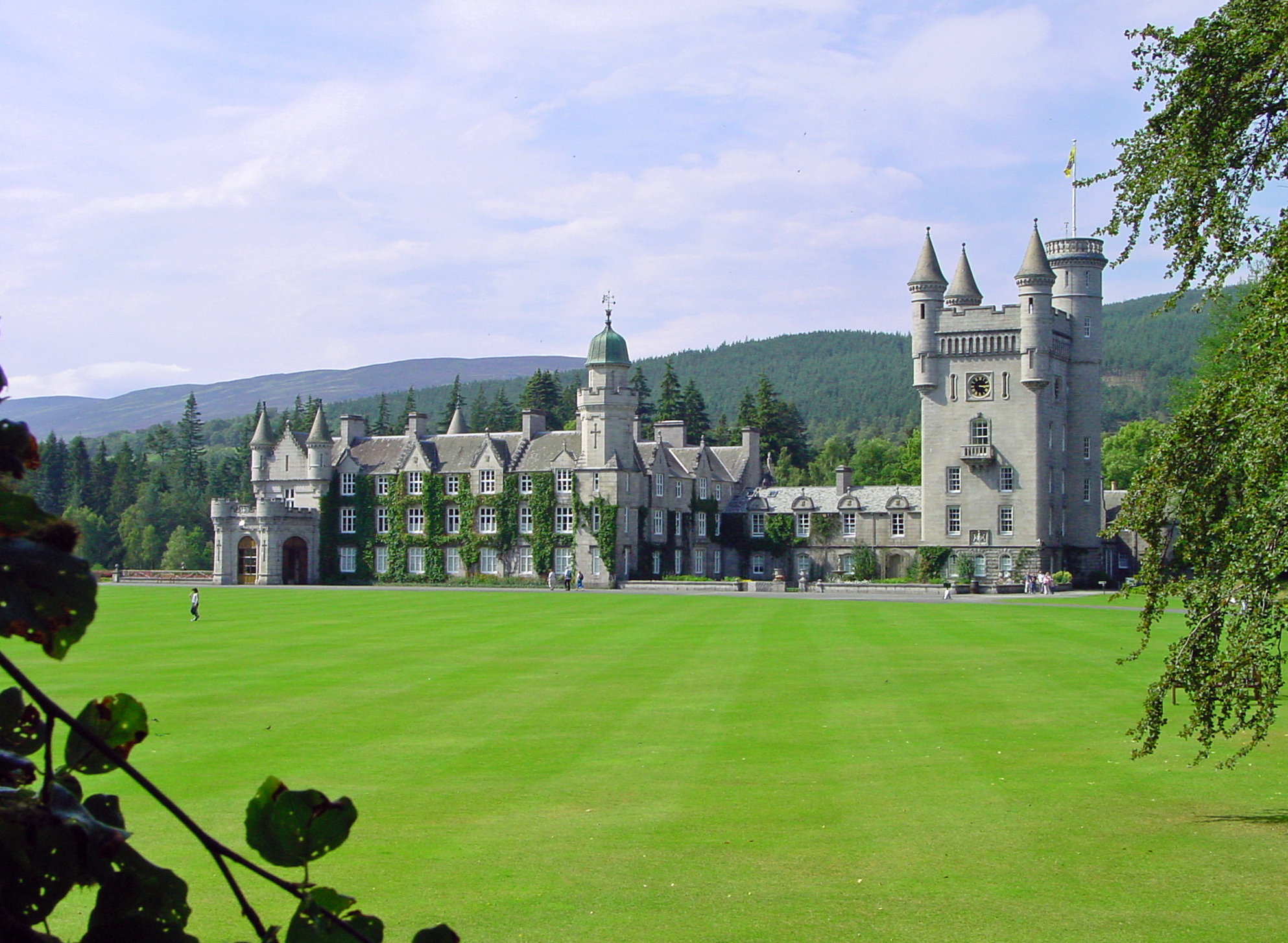 Balmoral Castle